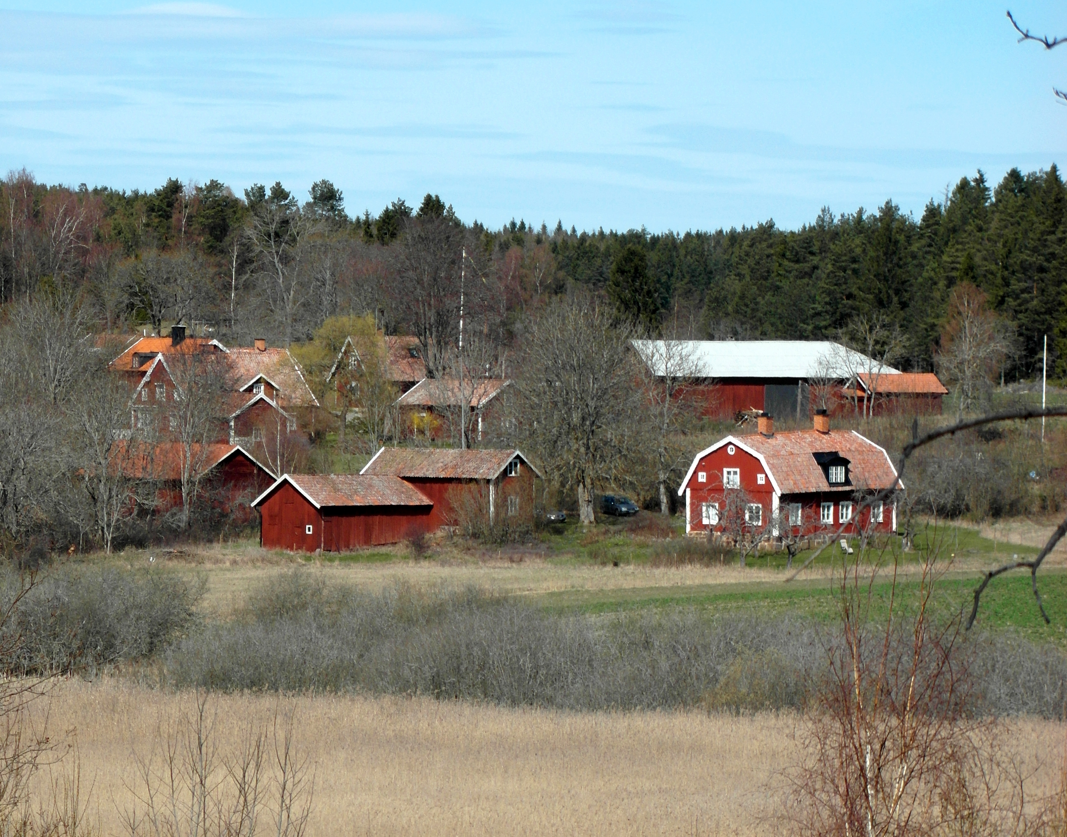 Viggeby, Kärnbo, Mariefred, Södermanland, vy från söder,april 2014